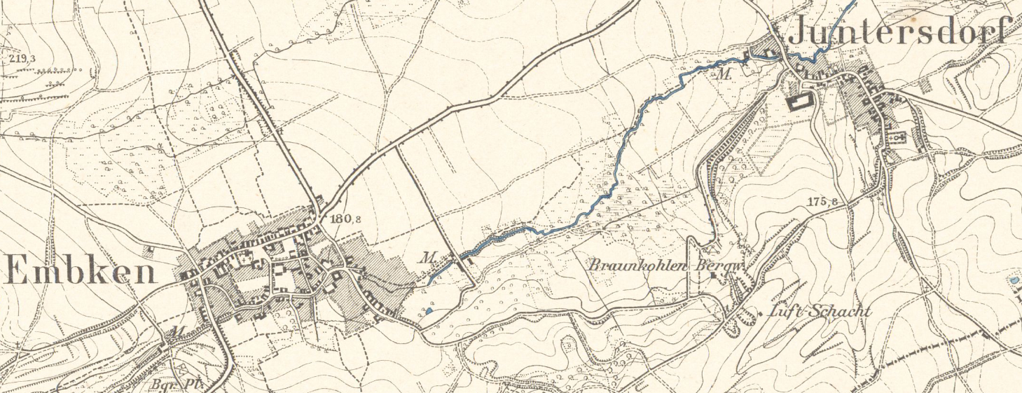 Ausschnitt aus dem Meßtischblatt Nr. 3093 "Zülpich" der Königlich Preußischen Landesaufnahme (Neuaufnahme von 1895), zeigt die Braunkohlegrube "Astraea" in Juntersdorf bei Zülpich